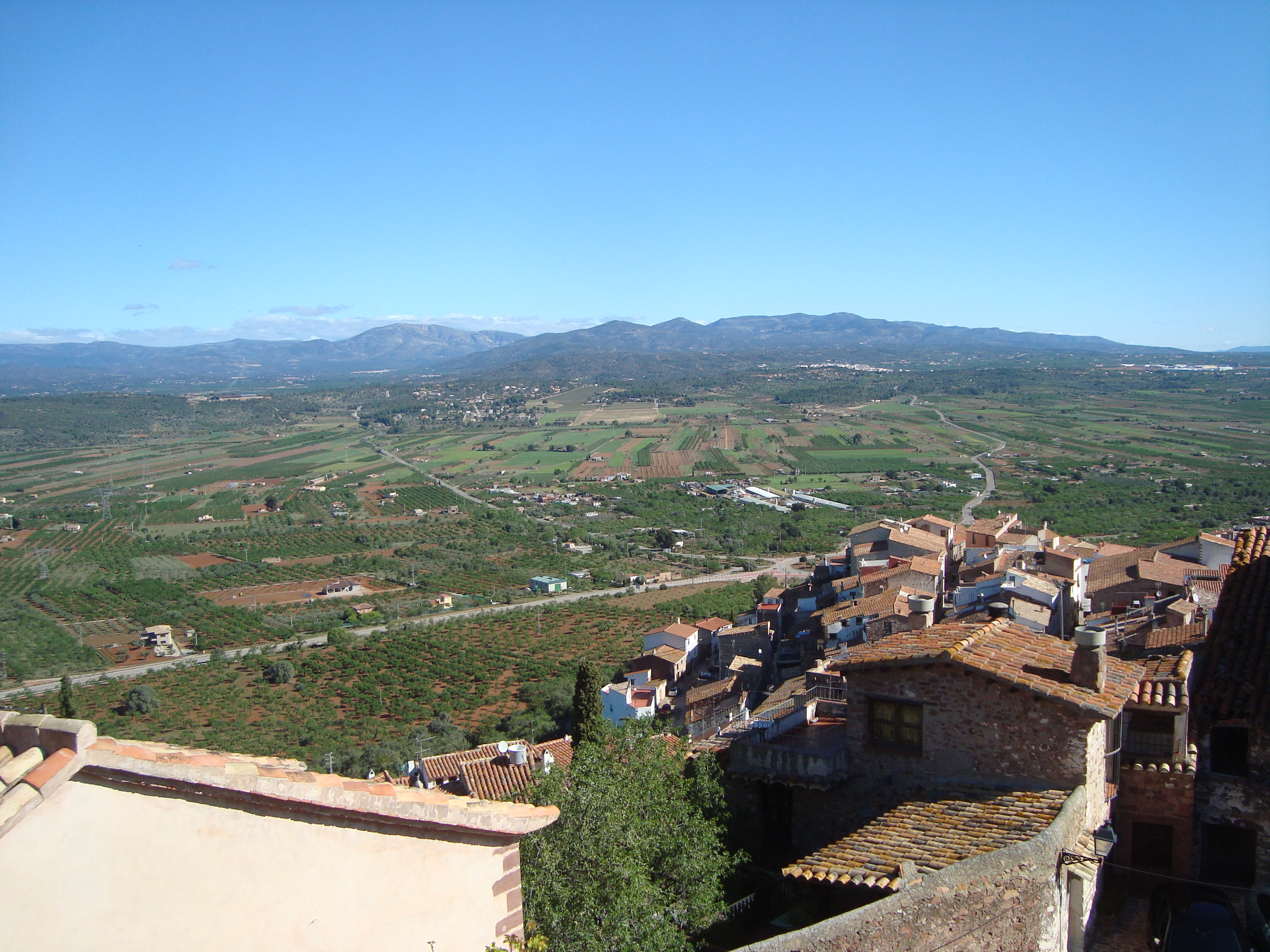 Plà de l'Arc, vist desde el castell de Vilafamés